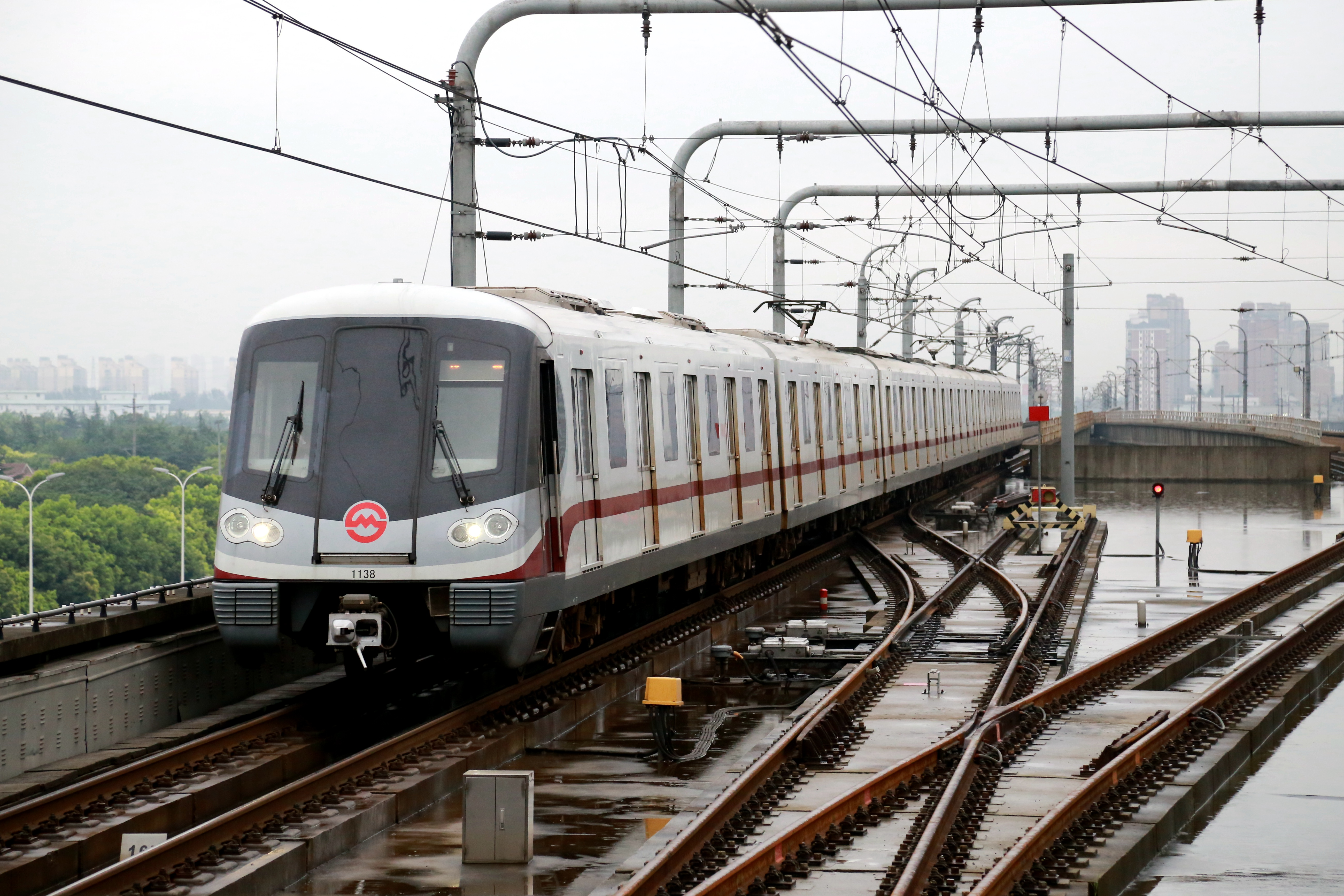 11号线列车进入南翔站